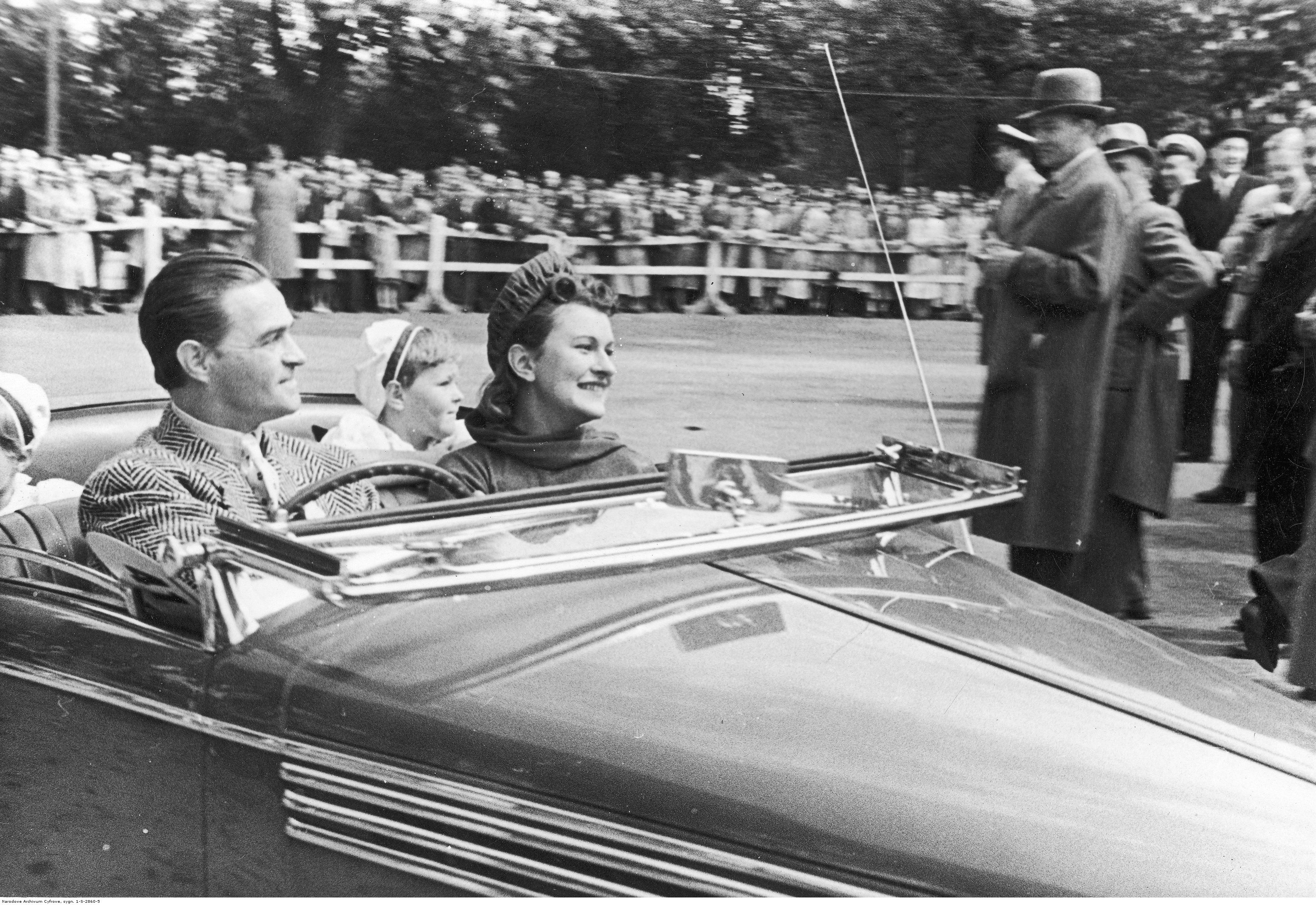 Aktor Adolf Dymsza z żoną Zofią i córkami w samochodzie Lancia Farina.